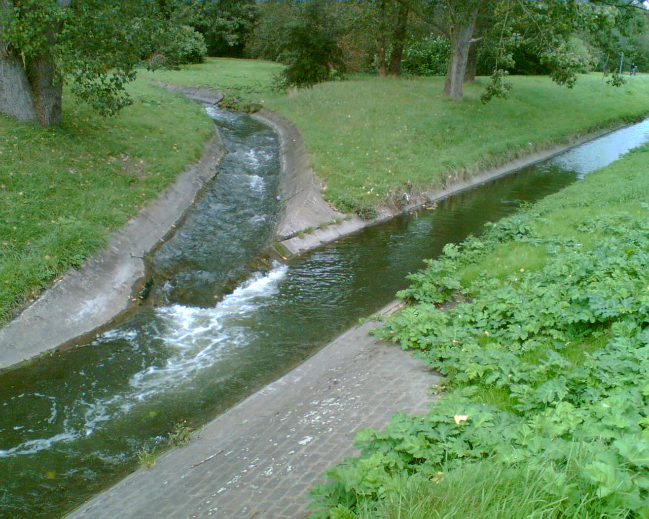 Zusammenfluß von Harpener Bach und Langendreerbach zum Oelbach, südlich des Ümminger Sees in Bochum